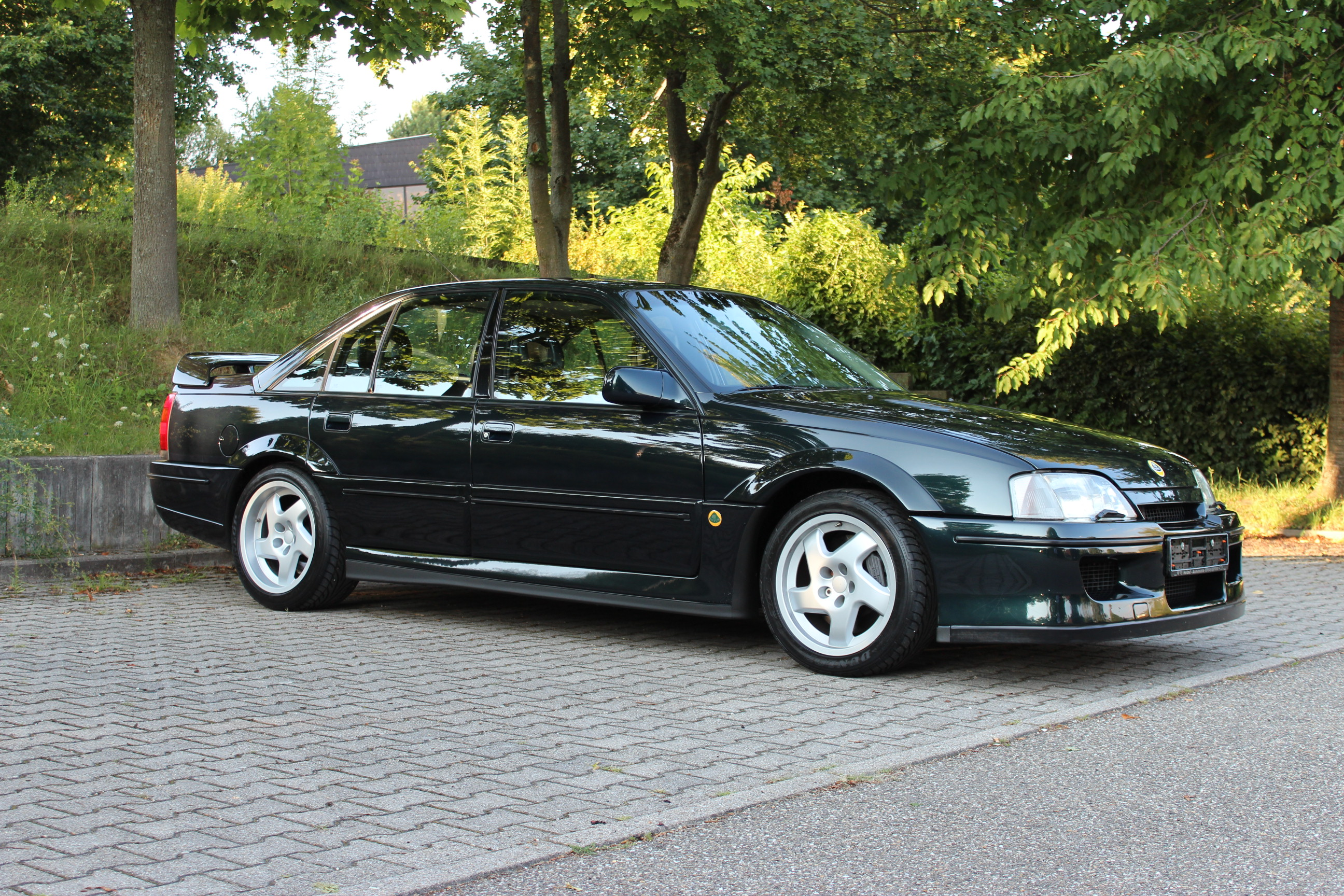 Zeigt den Lotus Omega von der Seite